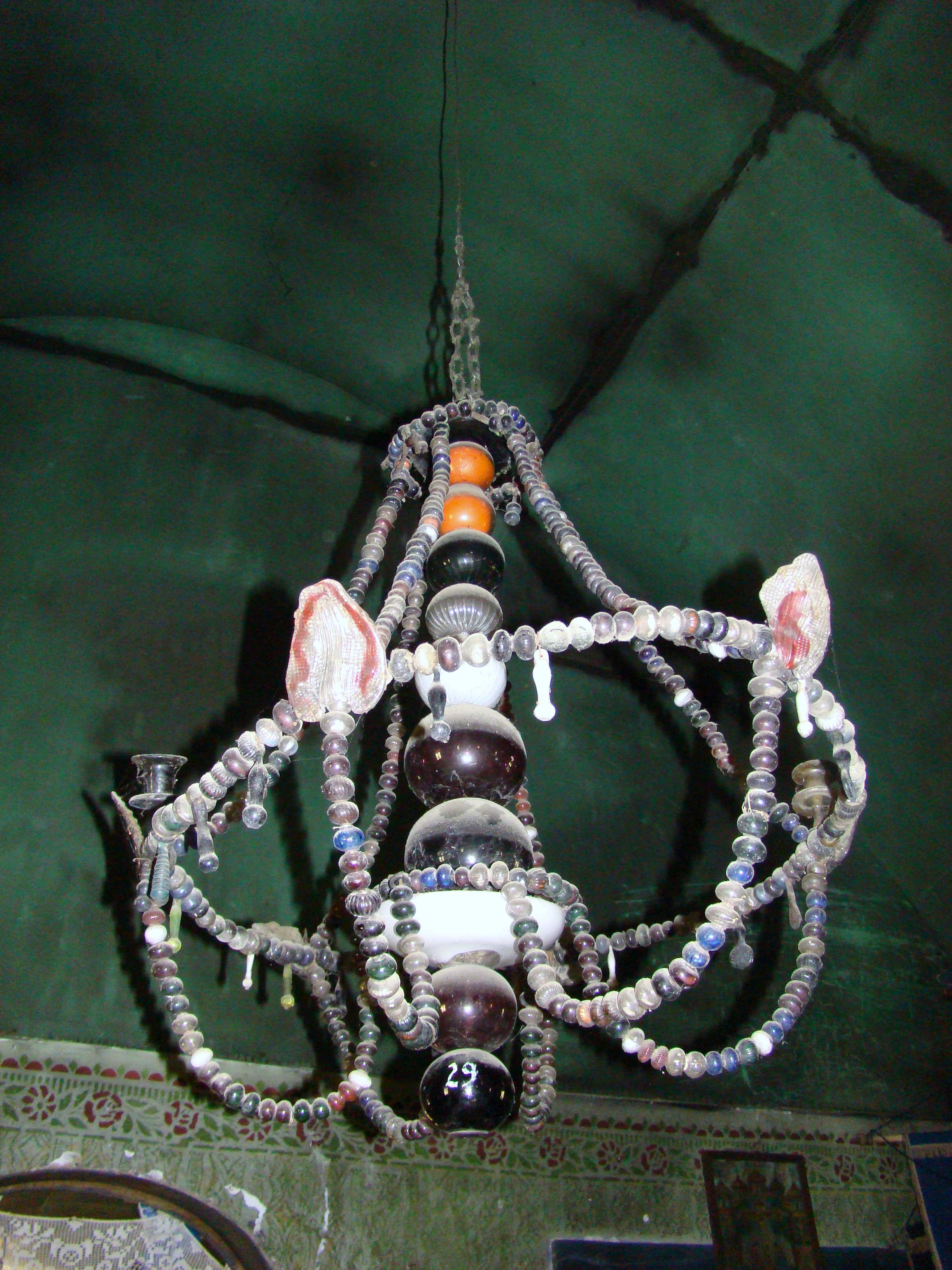 Biserica de lemn „Nașterea Maicii Domnului” din Săucani, județul Bihor